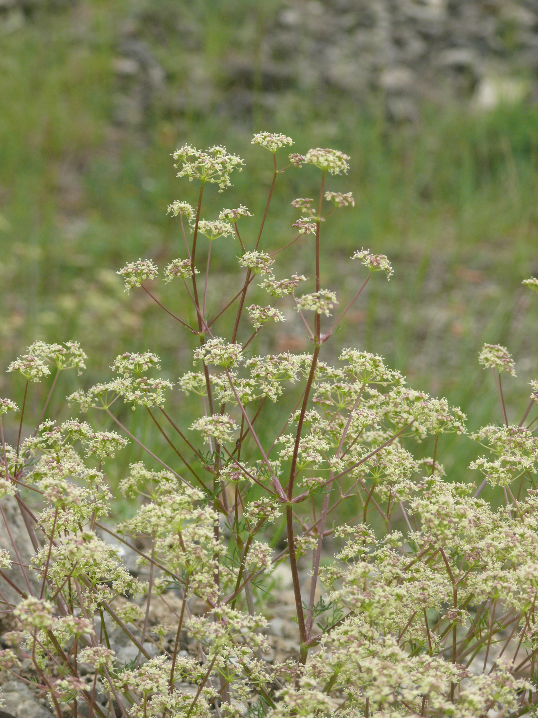 Trinia glauca,Mainfranken